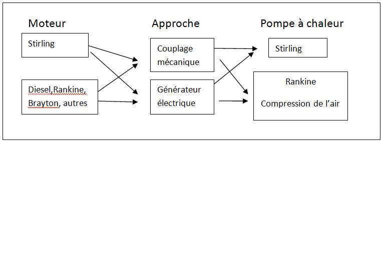 application du cycle Stirling dans la production de froid